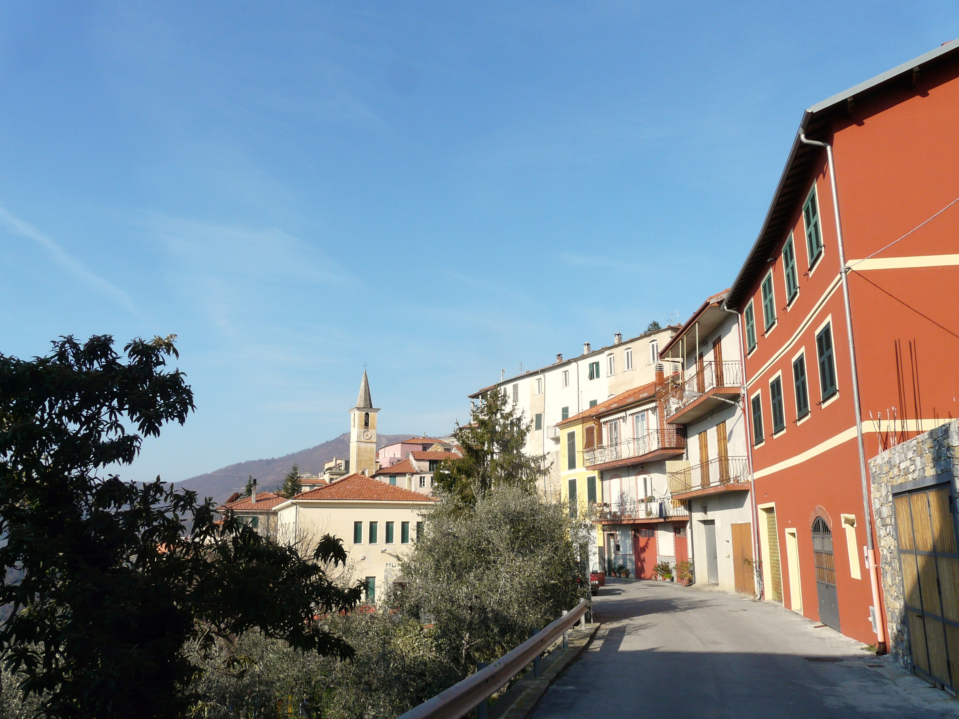 Cesio, Liguria, Italia